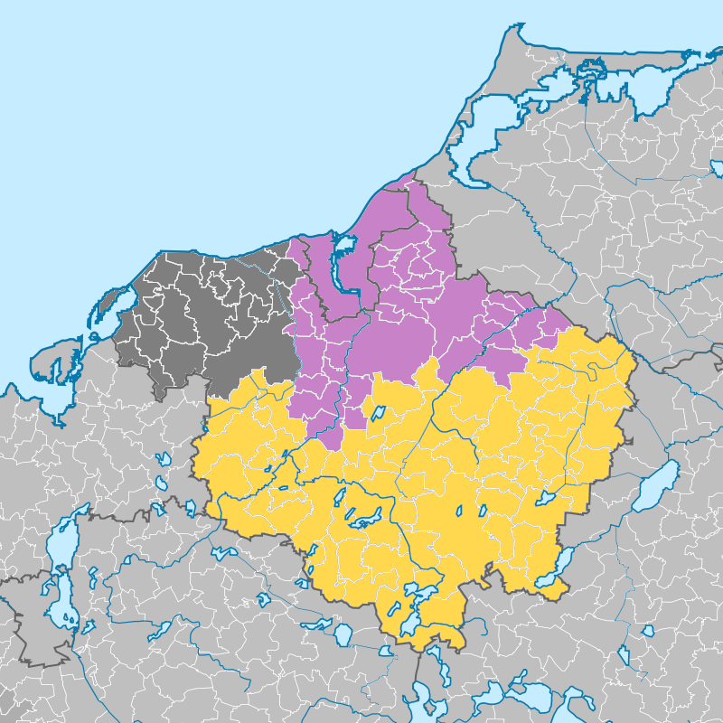 Karte der Amtsgerichtsbezirke im Landgerichtsbezirk Rostock vor der am 6. Oktober 2014 in Kraft getretenen Gerichtsstrukturreform Amtsgericht Bad Doberan Amtsgericht Rostock Amtsgericht Güstrow